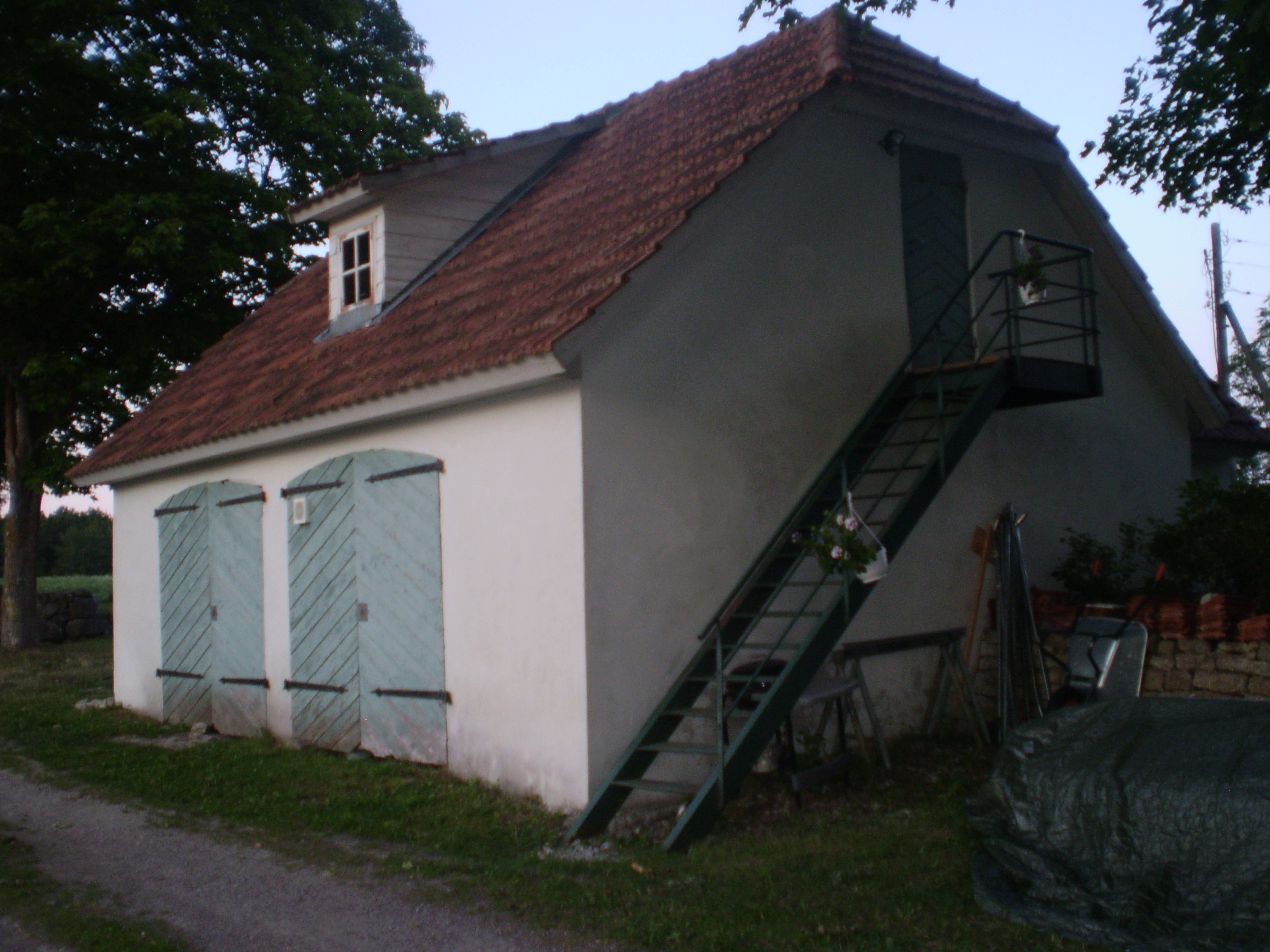 Loona mõisa tõllakuur